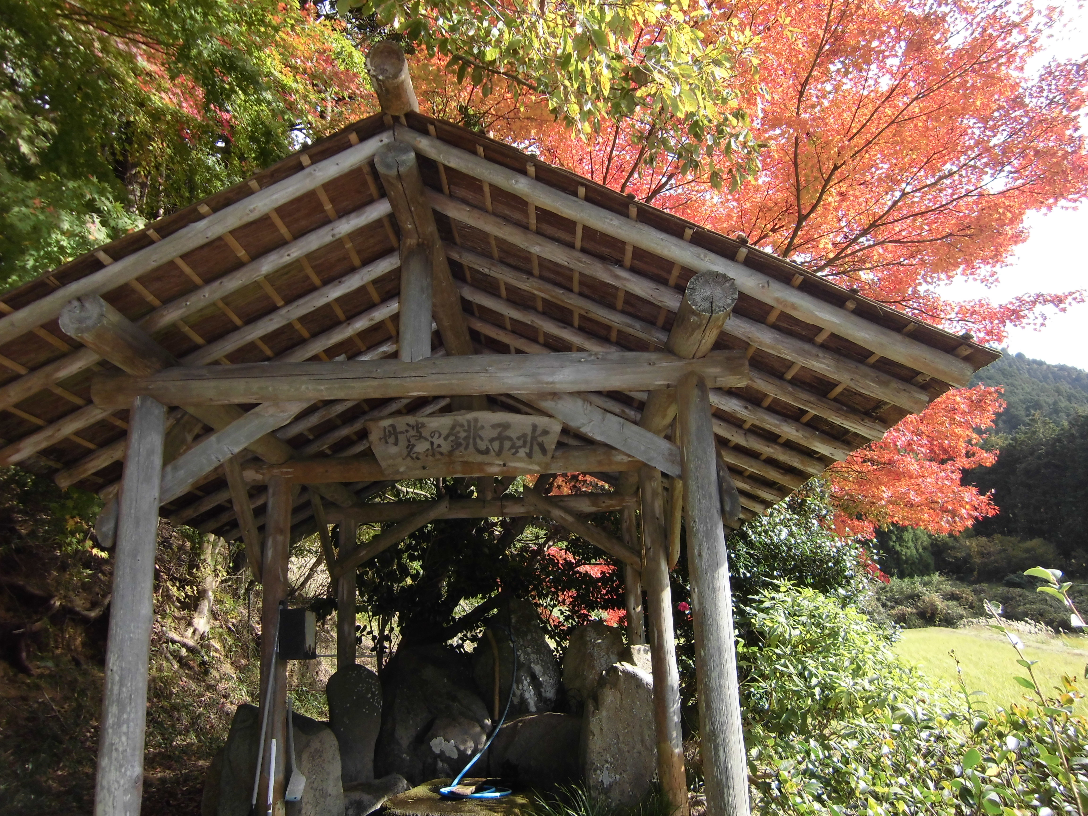 一休禅師が命名したと伝わる